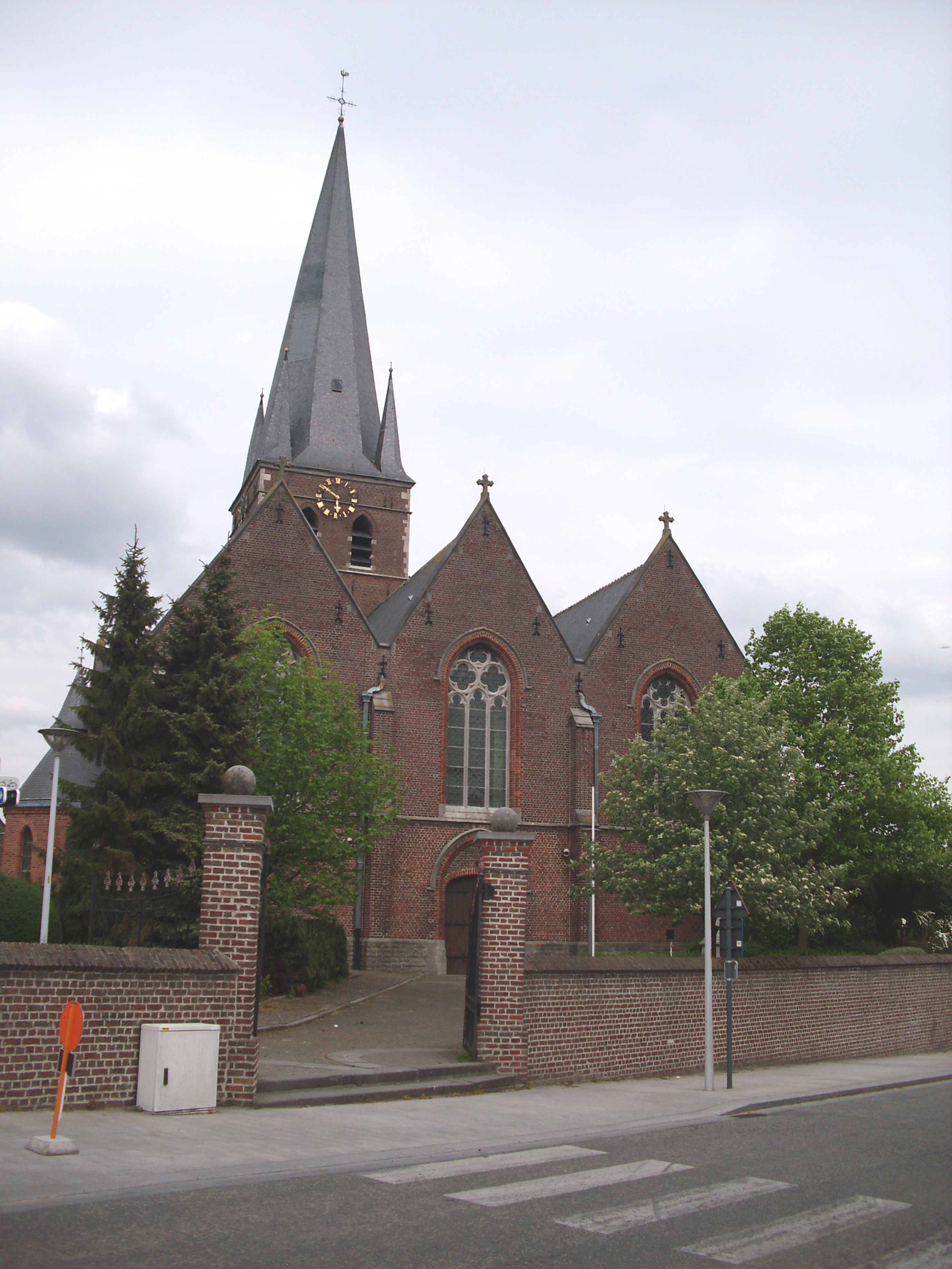 Kerk van Wortegem - Wortegem-Petegem - Oost-Vlaanderen - Vlaanderen - België